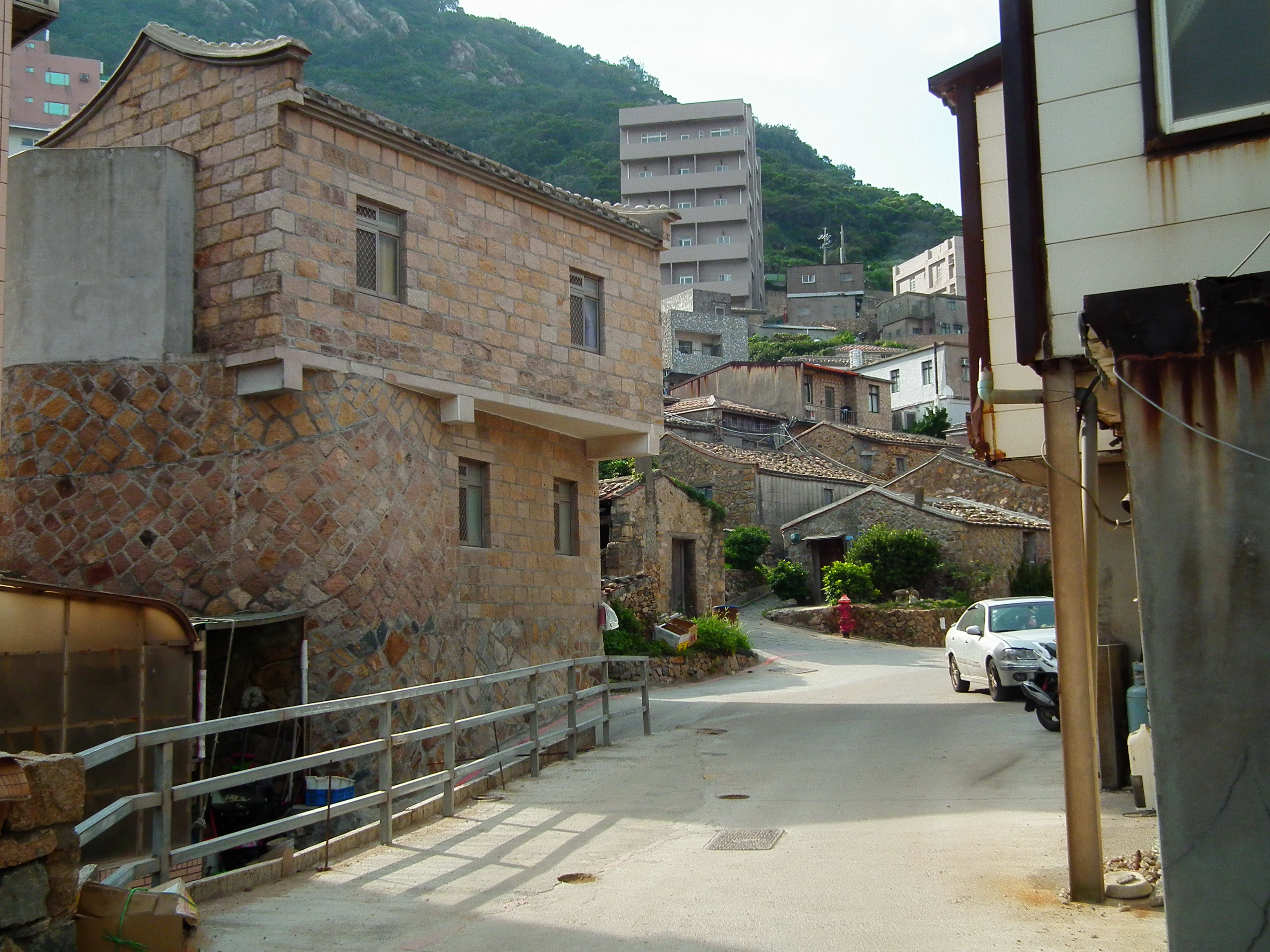 Daao Old Street 大澳老街